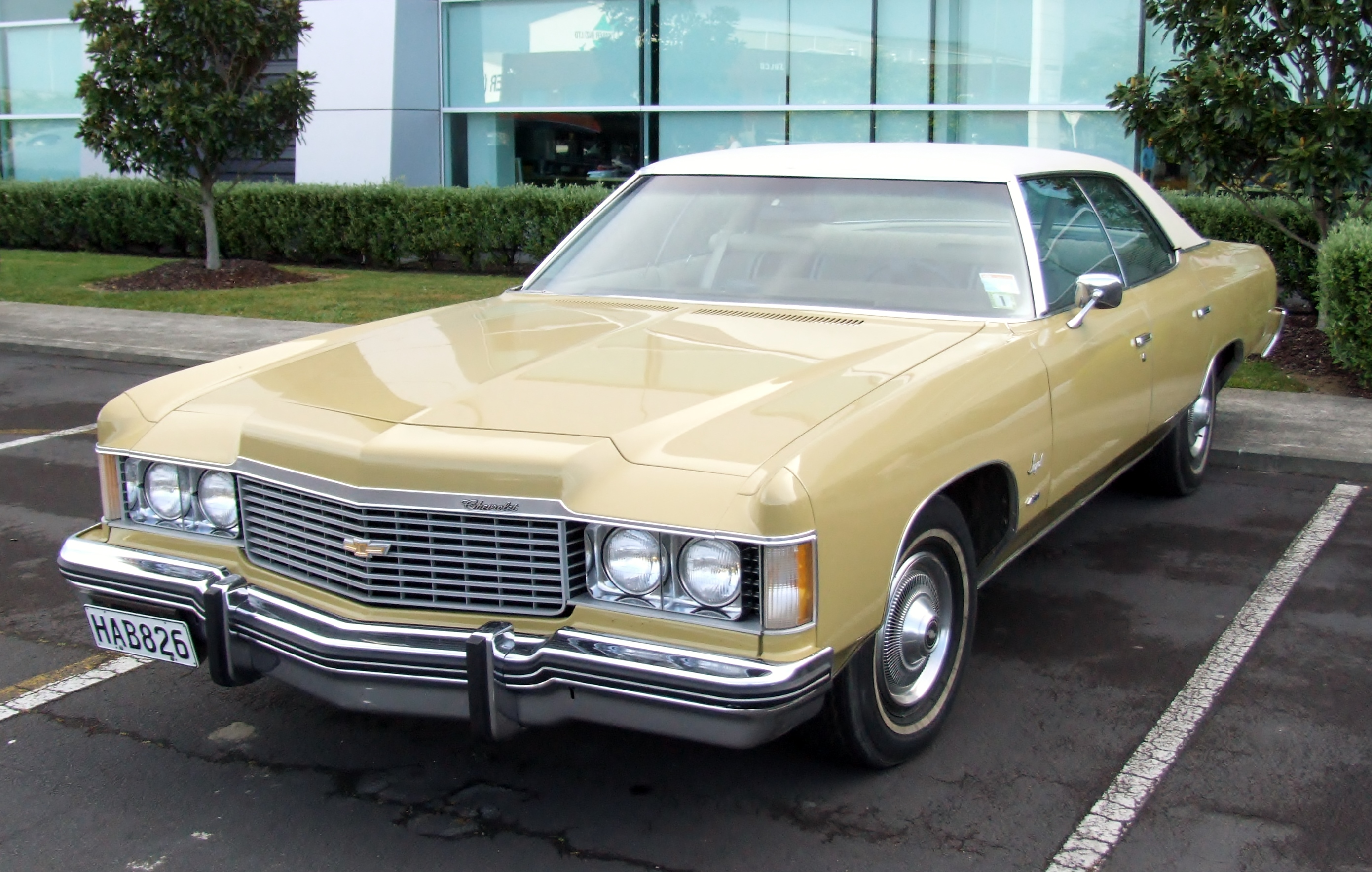 1974 Chevrolet Impala Sport Sedan